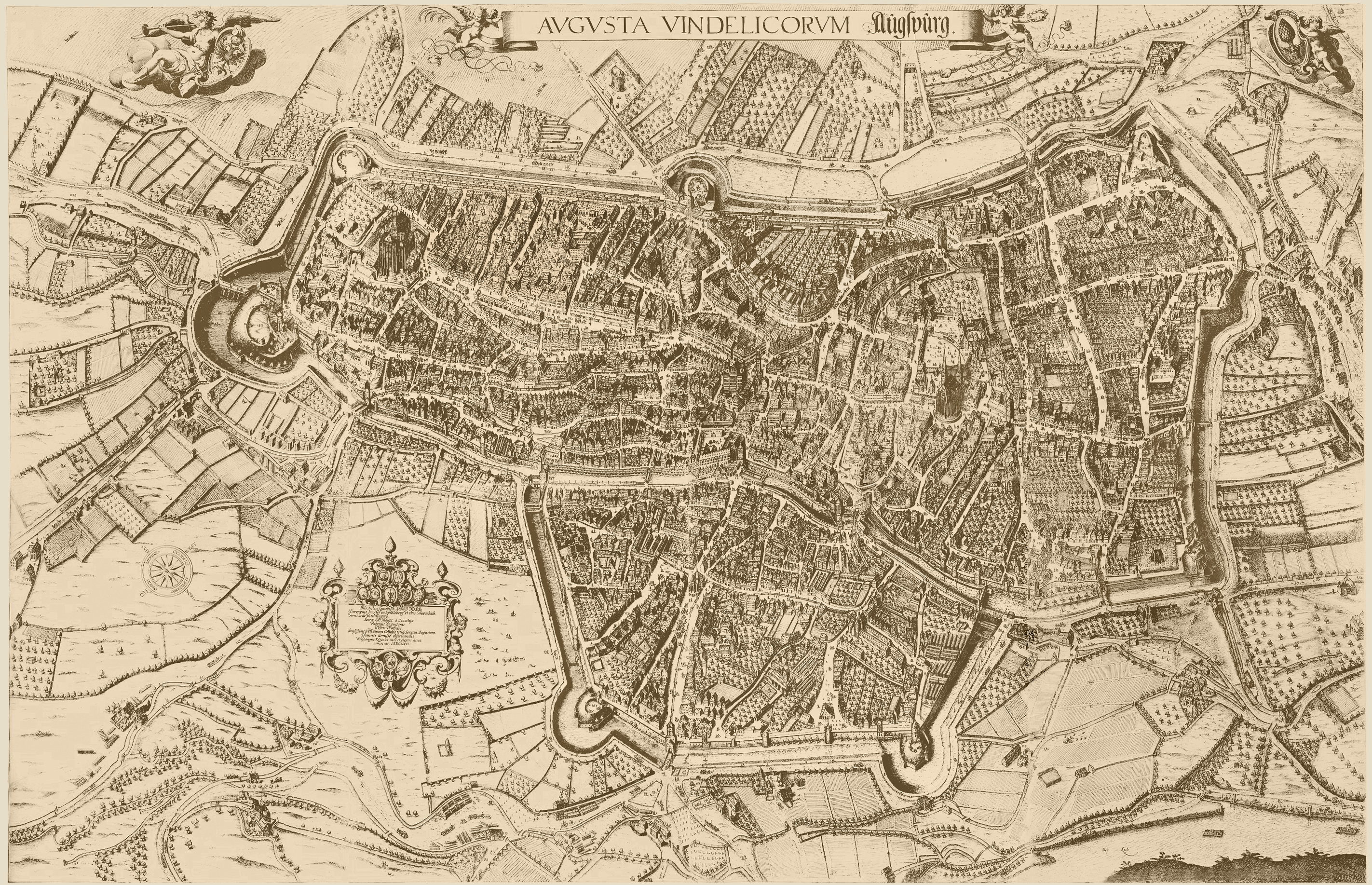 Stadtplan nach dem achtteiligen „Kilianplan“ von Augsburg